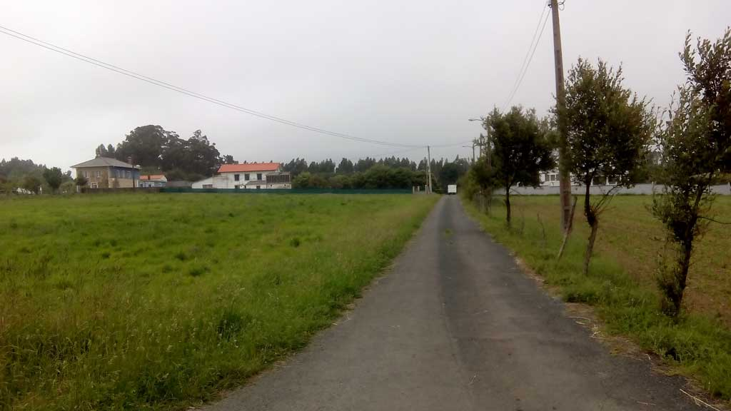 Vista de Leiras, Trasancos.